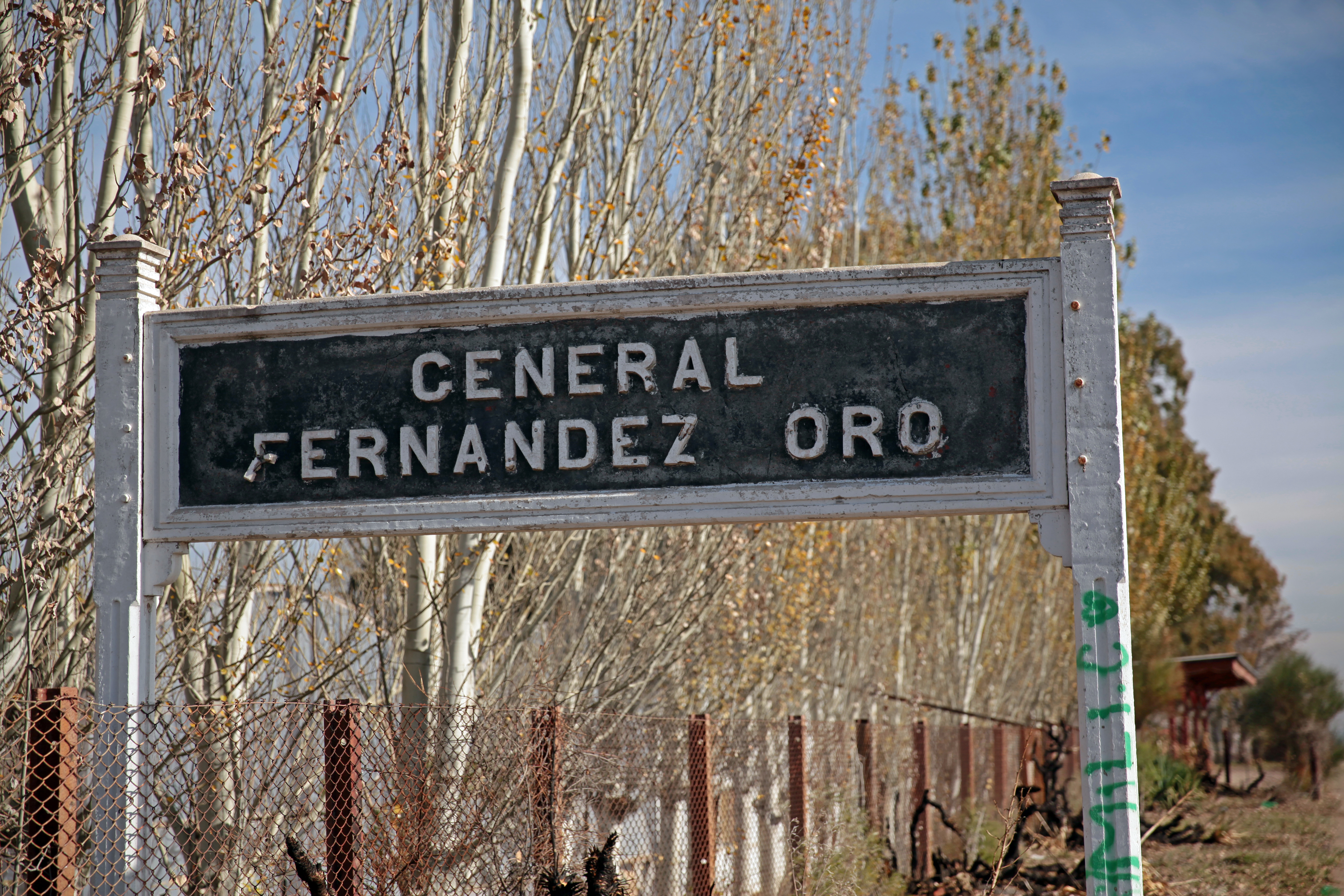 estacion tren - fernandez oro - nomenclador